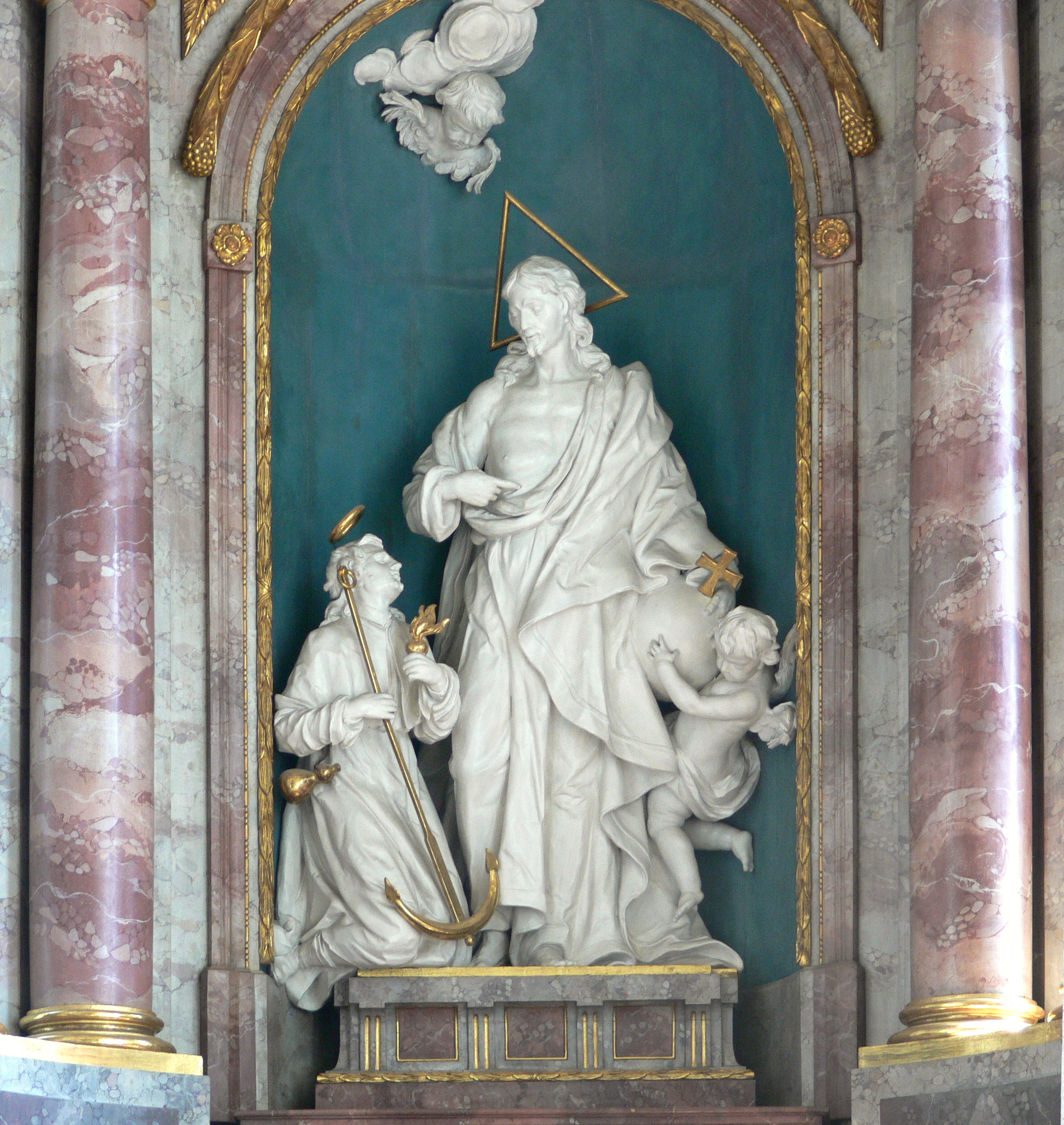 Bad Wurzach, Pfarrkirche St. Verena Hochaltar, Figurengruppe von Franz Xaver Feichtmayr d. J., Gruppe Christus mit einem Pilger (Glaube), Anker und brennendes Herz stehen für die Tugenden Hoffnung und Liebe